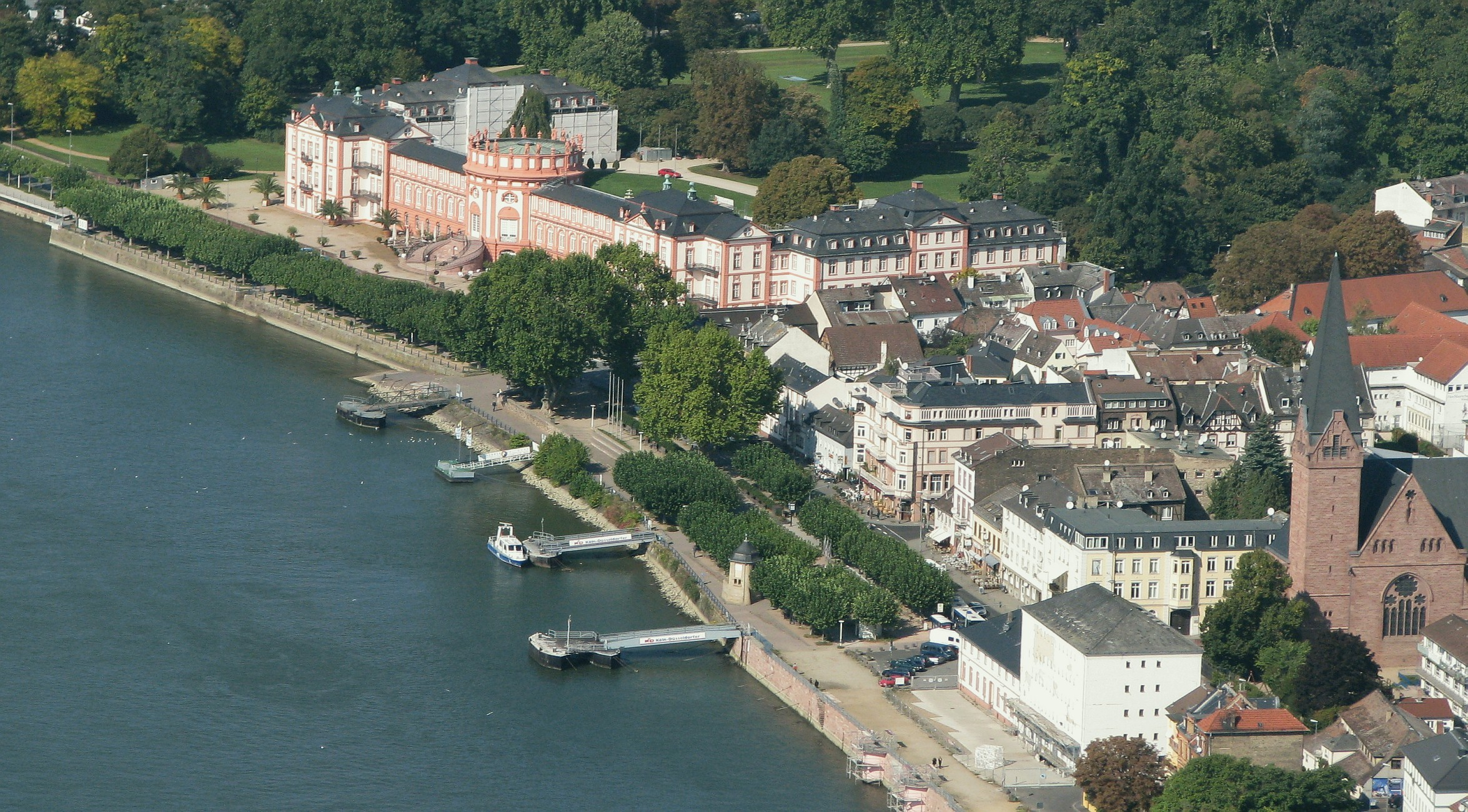 Luftbild vom Rheinufer in Wiesbaden-Biebrich mit dem Biebricher Schloss - Foto Wolfgang Pehlemann Wiesbaden